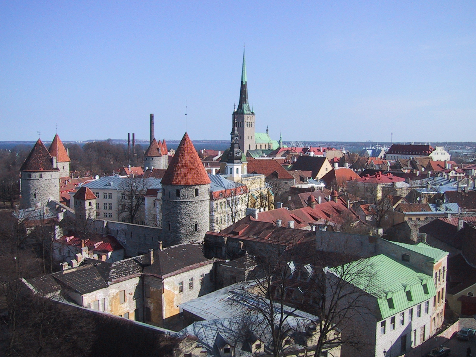 Tallinn, 2002 / selbstfotografiert / GNU